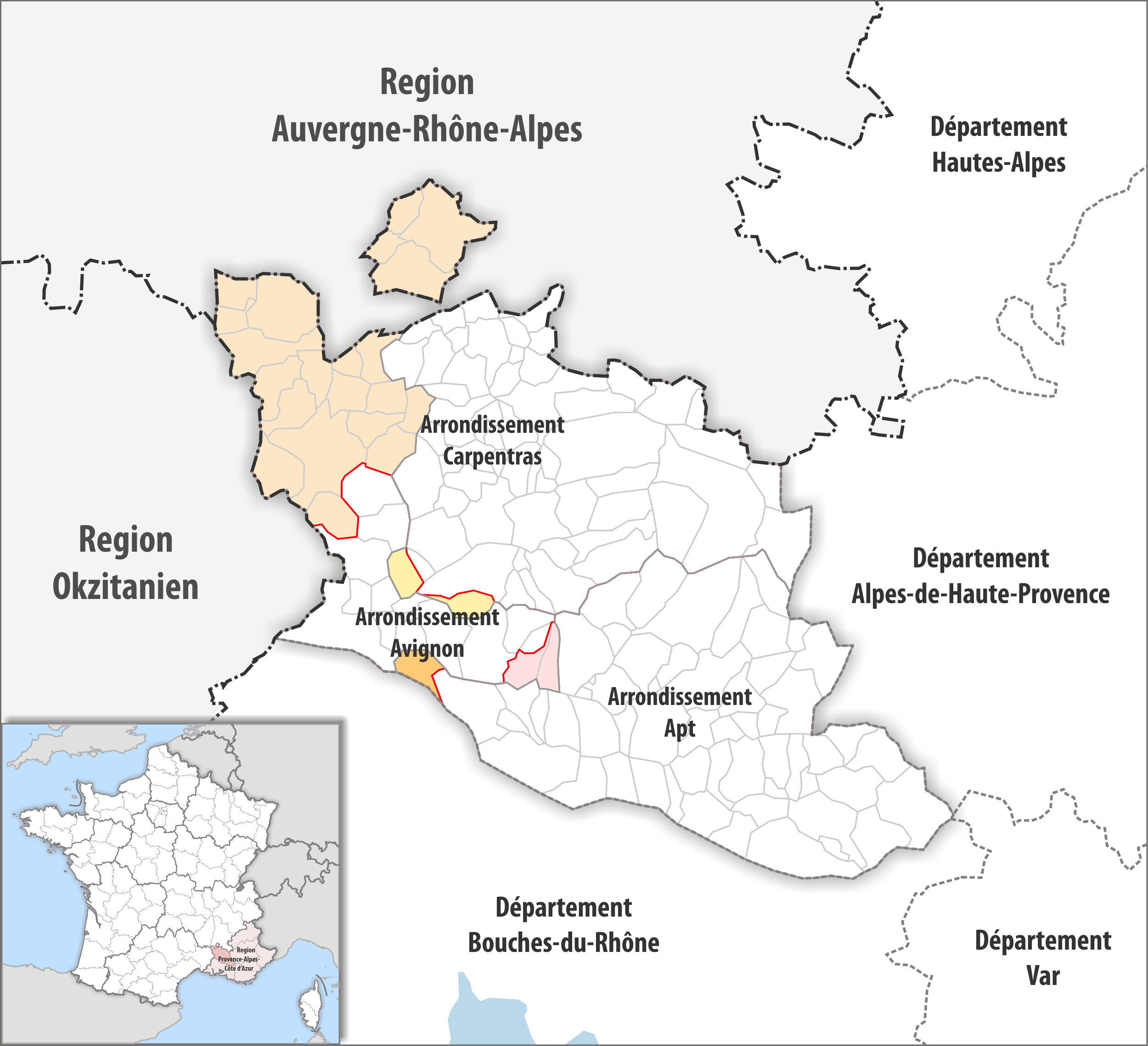 Arrondissements Anpassungen auf 2017 im Departement Vaucluse